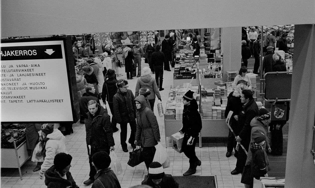 Tavaratalo Sokos Jyväskylä, alakerta 22.12.1980